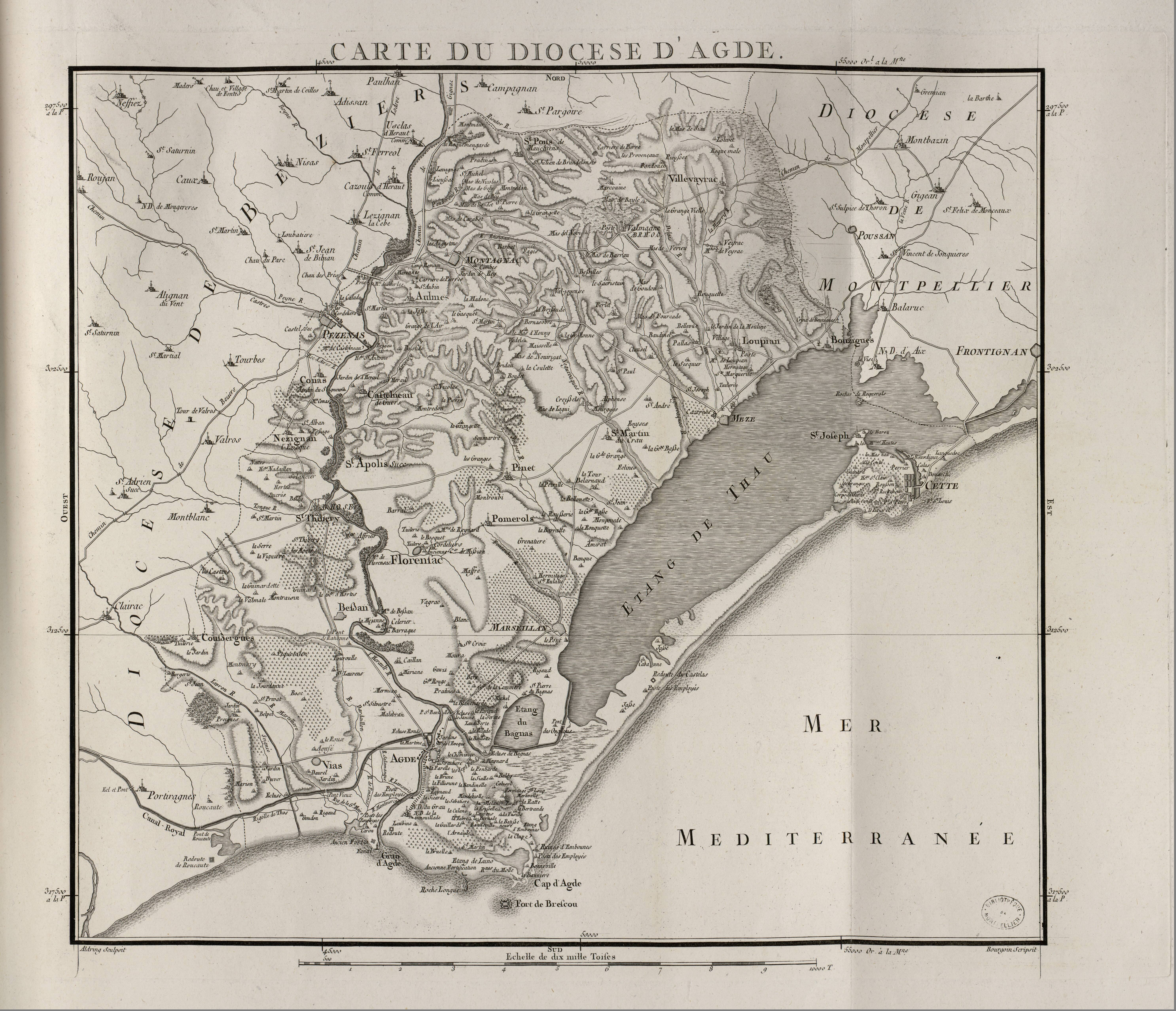 Carte du diocèse d'Agde, extraite de Diocèses de la province du Languedoc (1781)